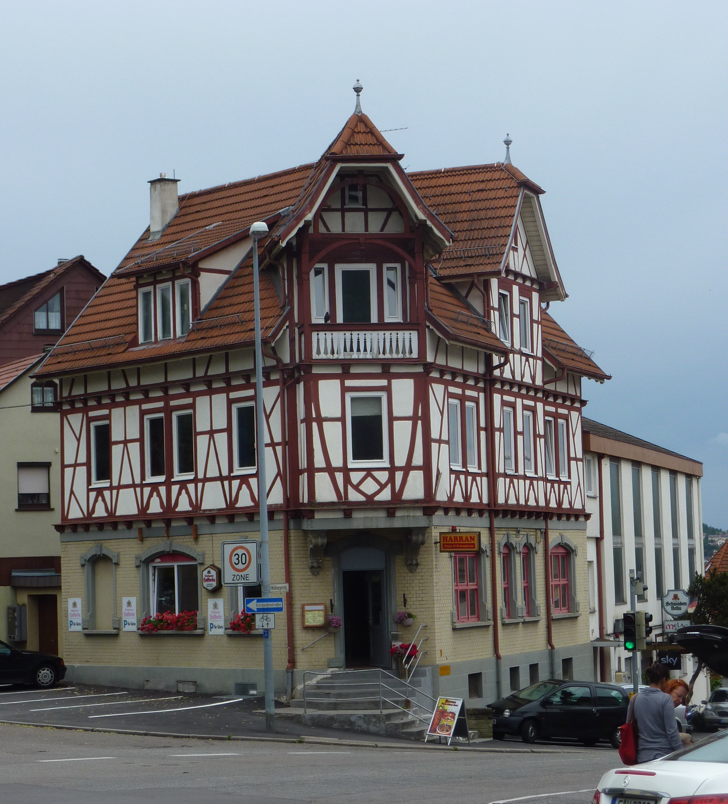 denkmalgeschütztes Lokal ("Schöne Aussicht") in der Mülbergerstraße 180 in Esslingen am Neckar